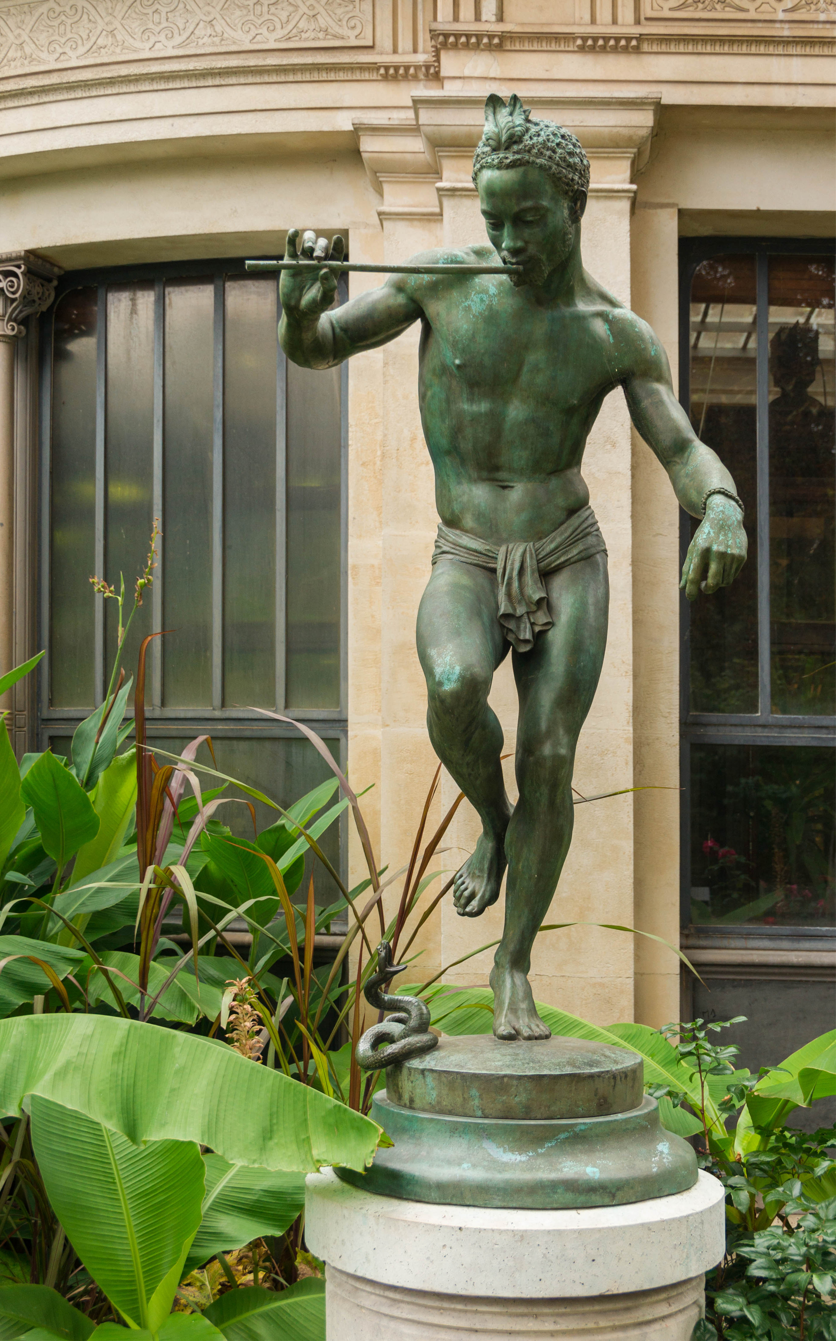 Le Charmeur de serpent ou le Nubien dansant, de Charles-Arthur Bourgeois.